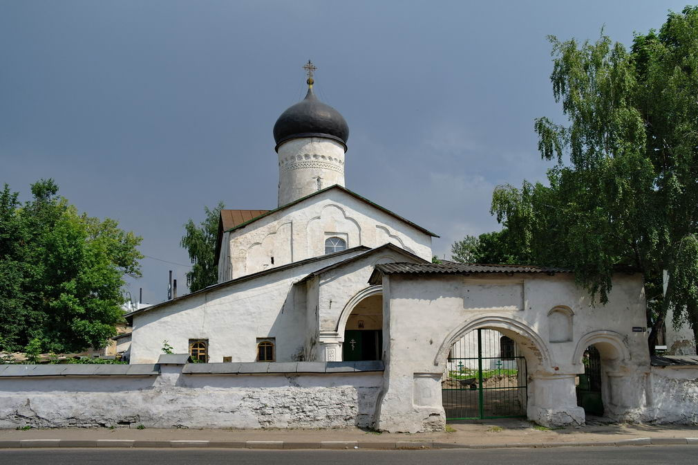 Козьмы (Космы) и Дамиана с Примостья, церковь. Адрес: г. Псков, улица Леона Поземского, 7.